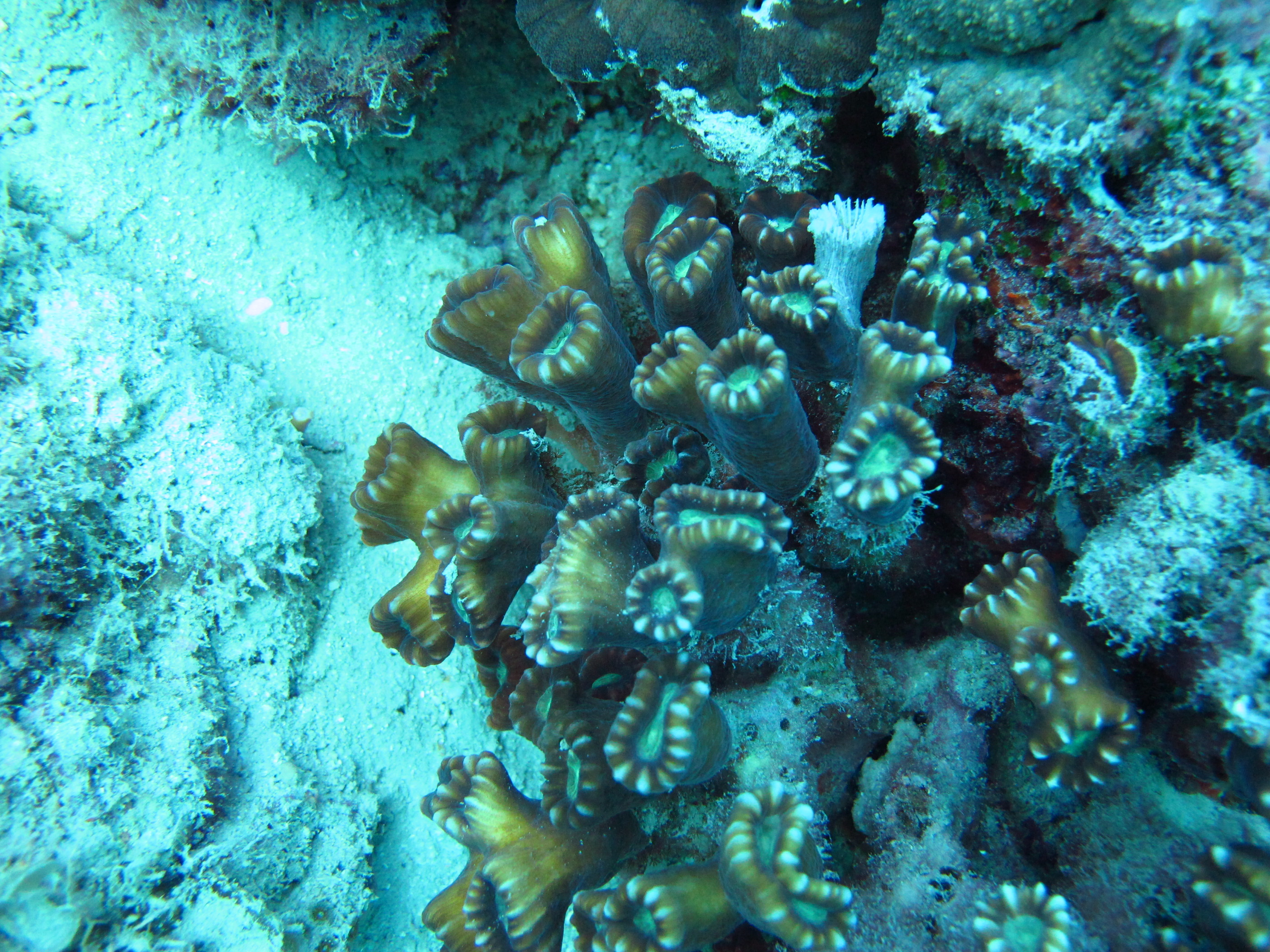 Caulastraea furcata, en isla Masig, Estrecho de Torres, Australia